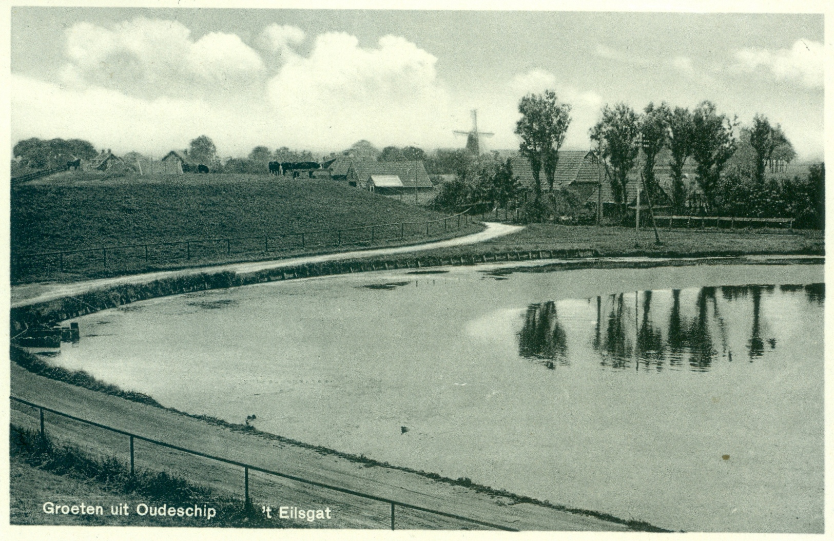 't Eilsgat bij Oudeschip voor de oorlog voordat de molen werd afgebroken